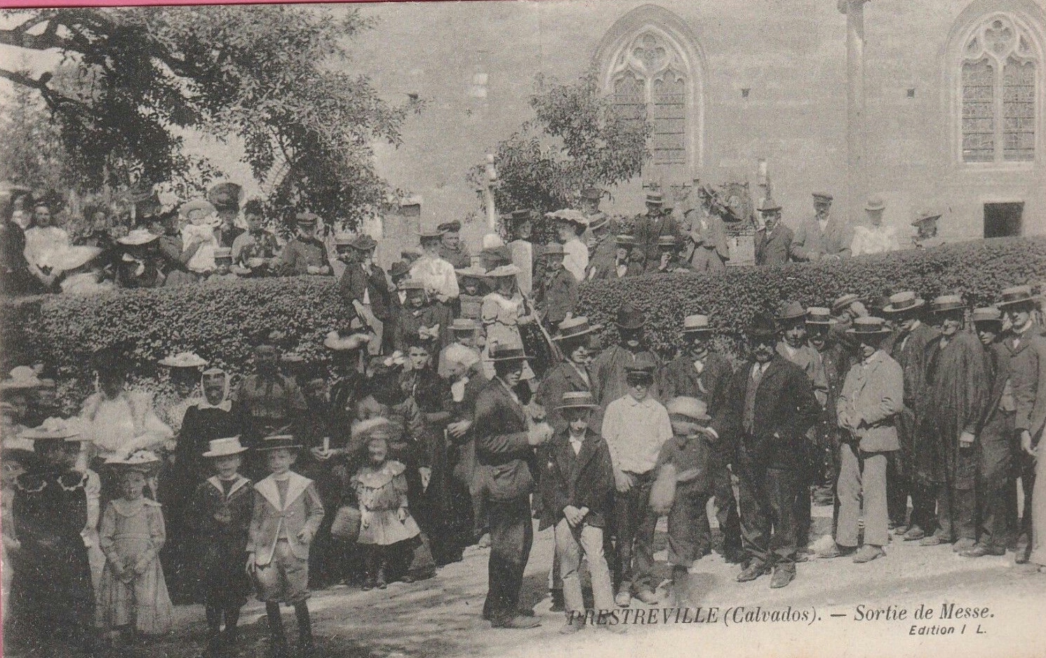 Sortie de messe à Prestreville (Calvados) dans le diocèse de Bayeux vers 1910.